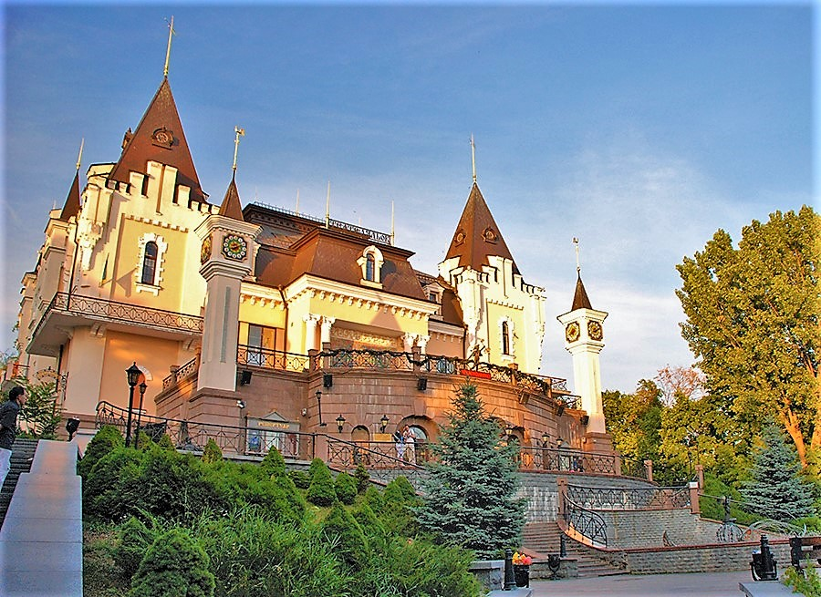 Ляльковий театр, місто Київ